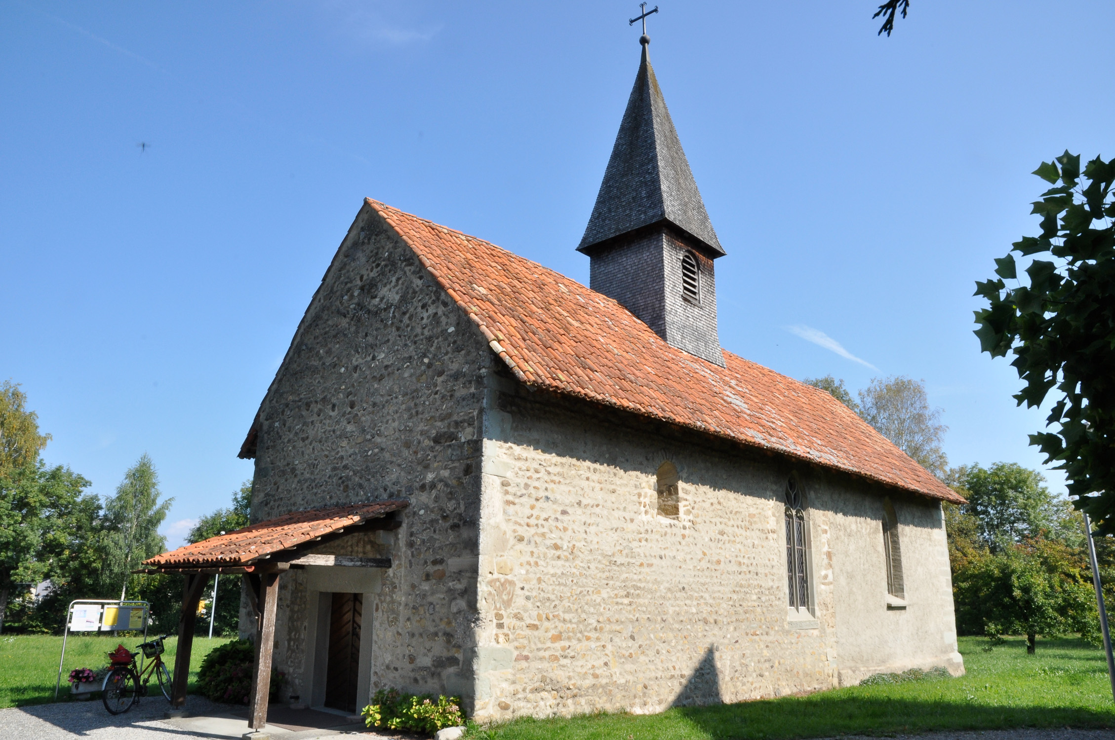 Landschlacht: Kapelle St. Leonhard, Münsterlingen TG Ansicht von Süden